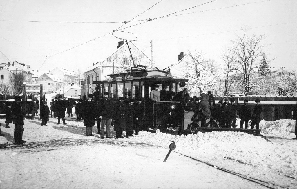 Львів трамвай-кінець 19 століття.jpg: Львівський трамвай наприкінці 19 ст.